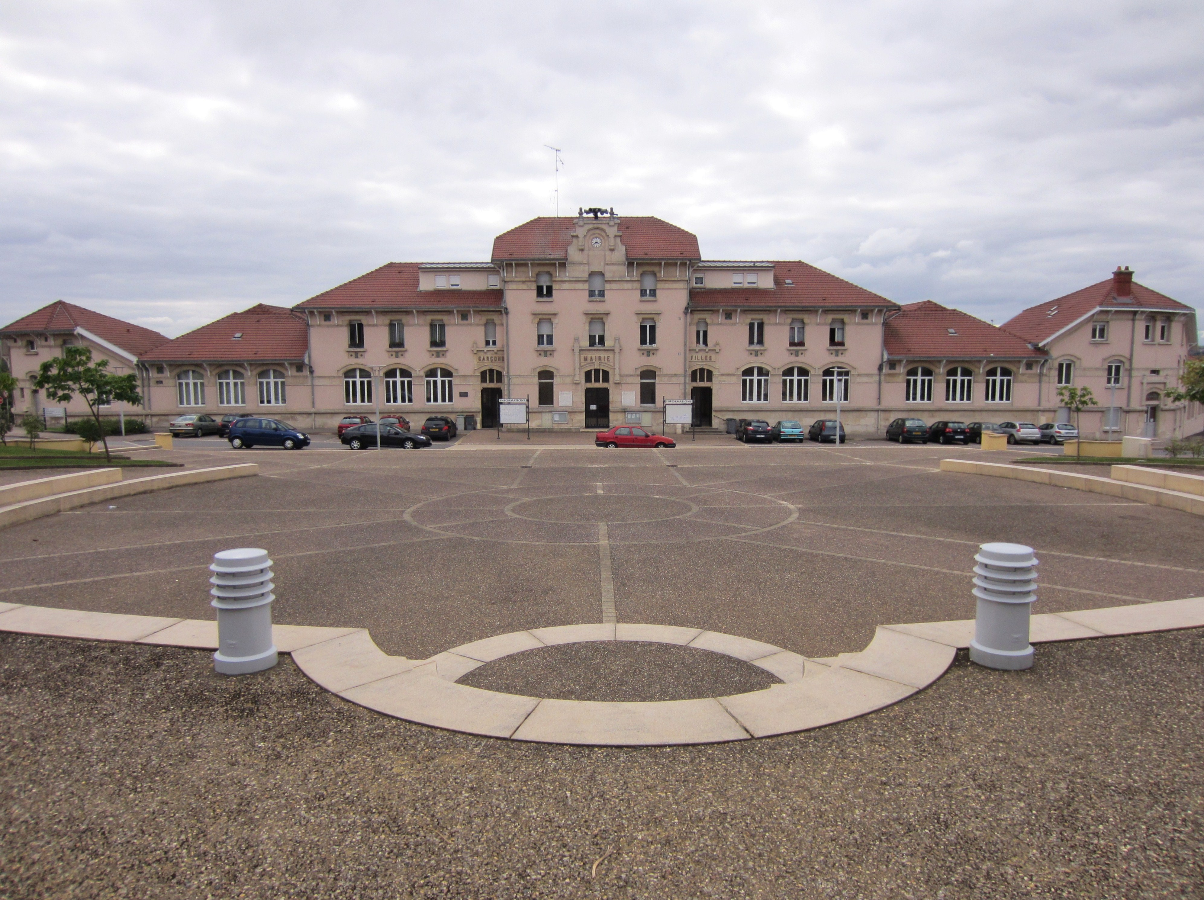 Description mairie Mancieulles Date21 September 2011Sourcemon appareil photoAuthorAimelaimePermission (Reusing this file) mairie Mancieulles